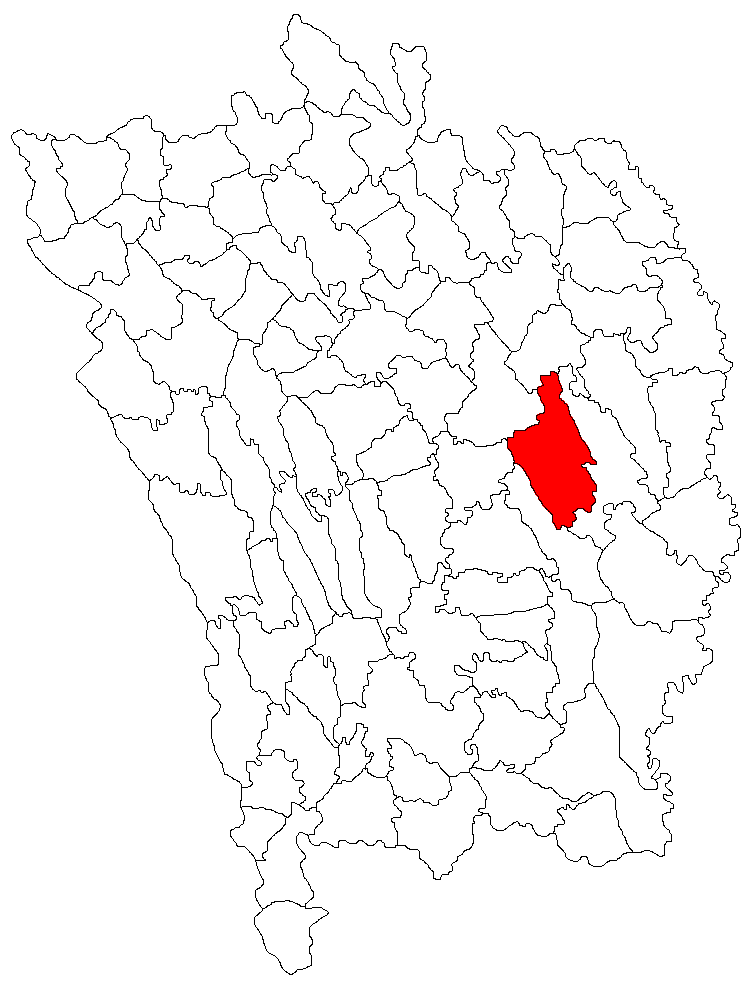 Categorie:Hărţi ale judeţului Vaslui